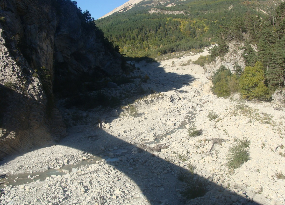 Le Béoux au défilé de Potrachon. On voit la falaise de la rive droite (cf. Béoux-03.JPG), et l'ombre portée du pont de la route (cf. Béoux-00.JPG).